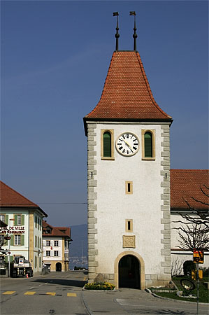 Cudrefin: la tour